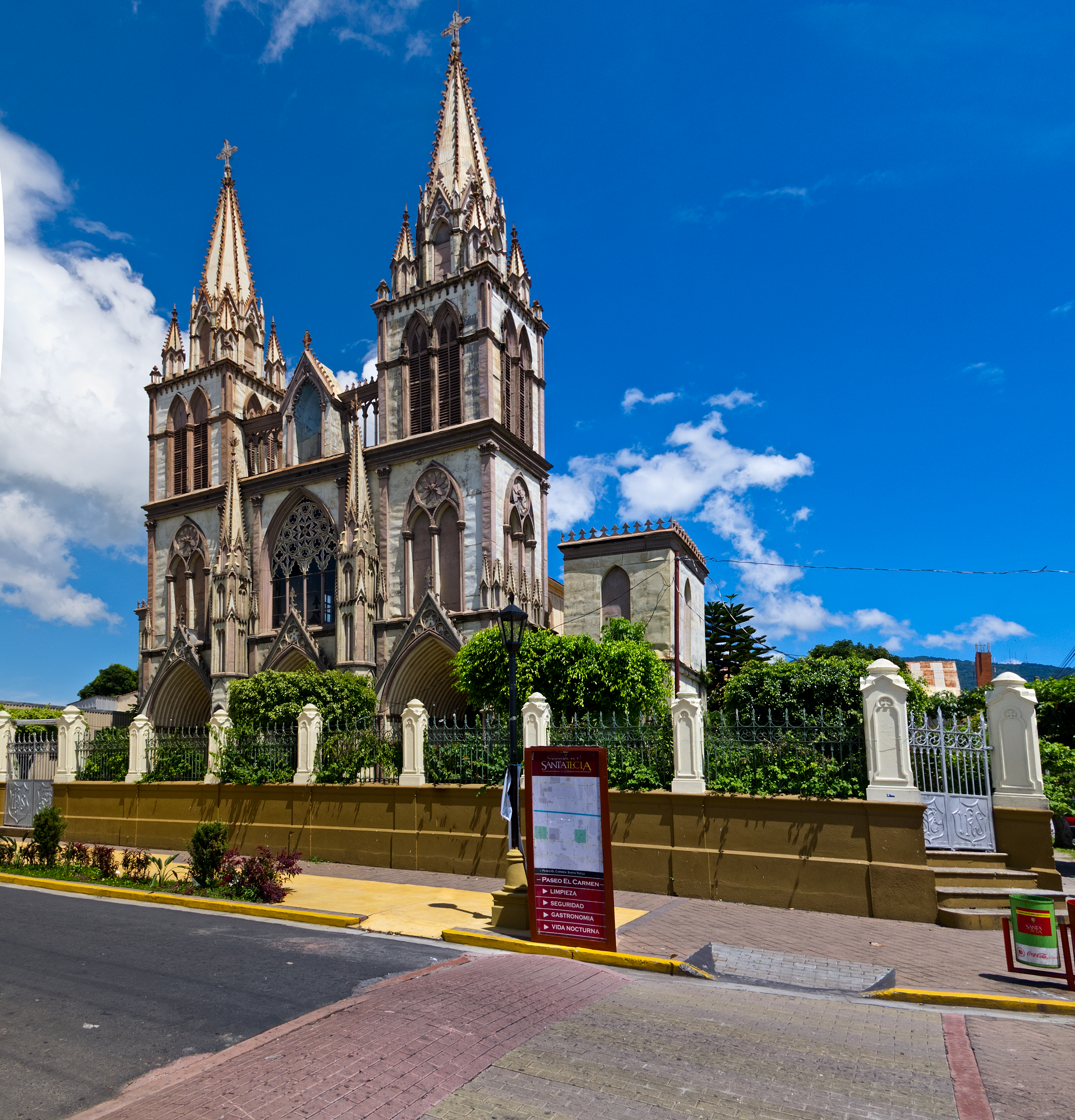 Catedral de Santa Tecla, 2012. Nota los ladrillos que el alcaldía instaló en la calle este año.